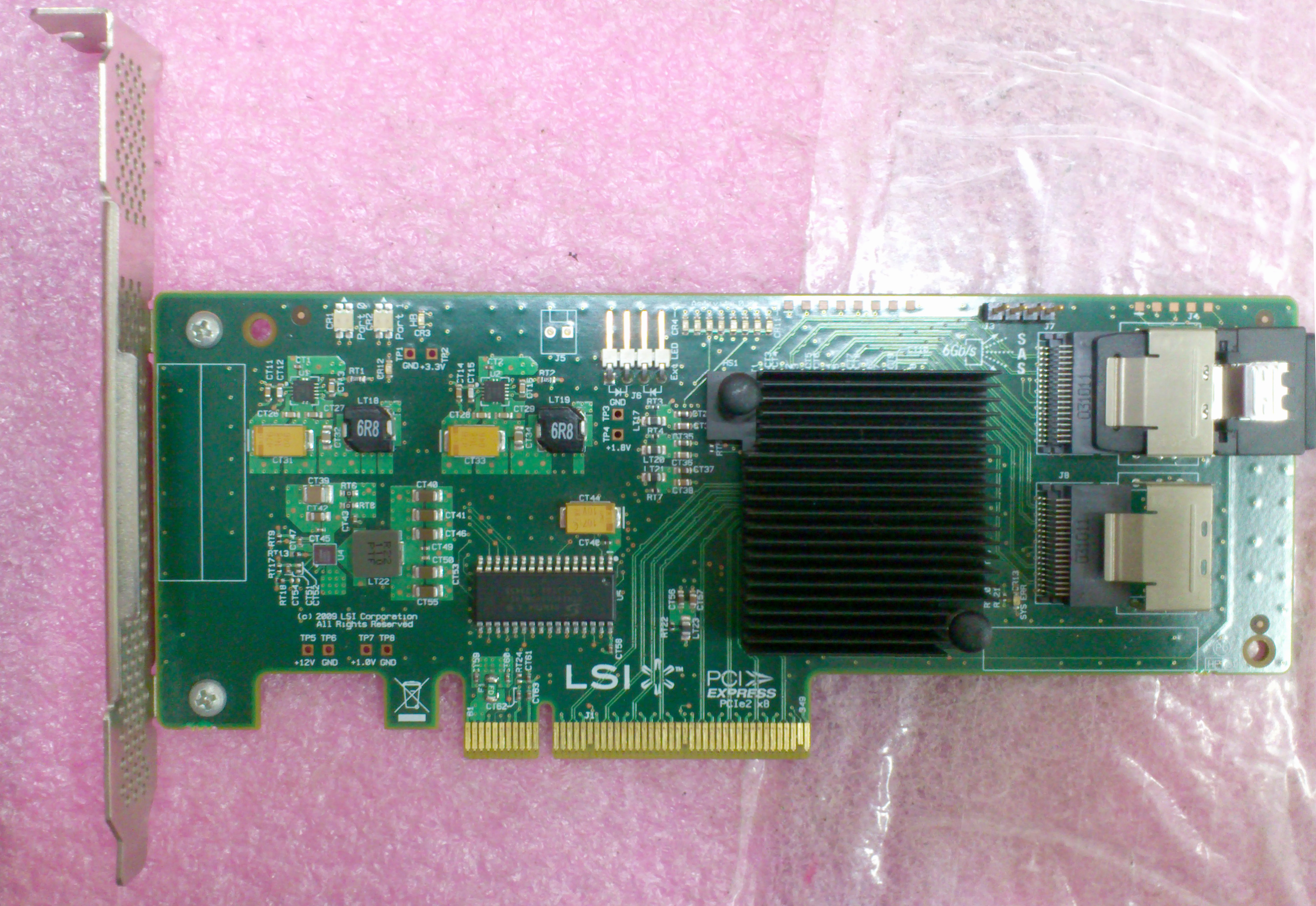 LSI SAS9211-8i H3-25250-02B正面